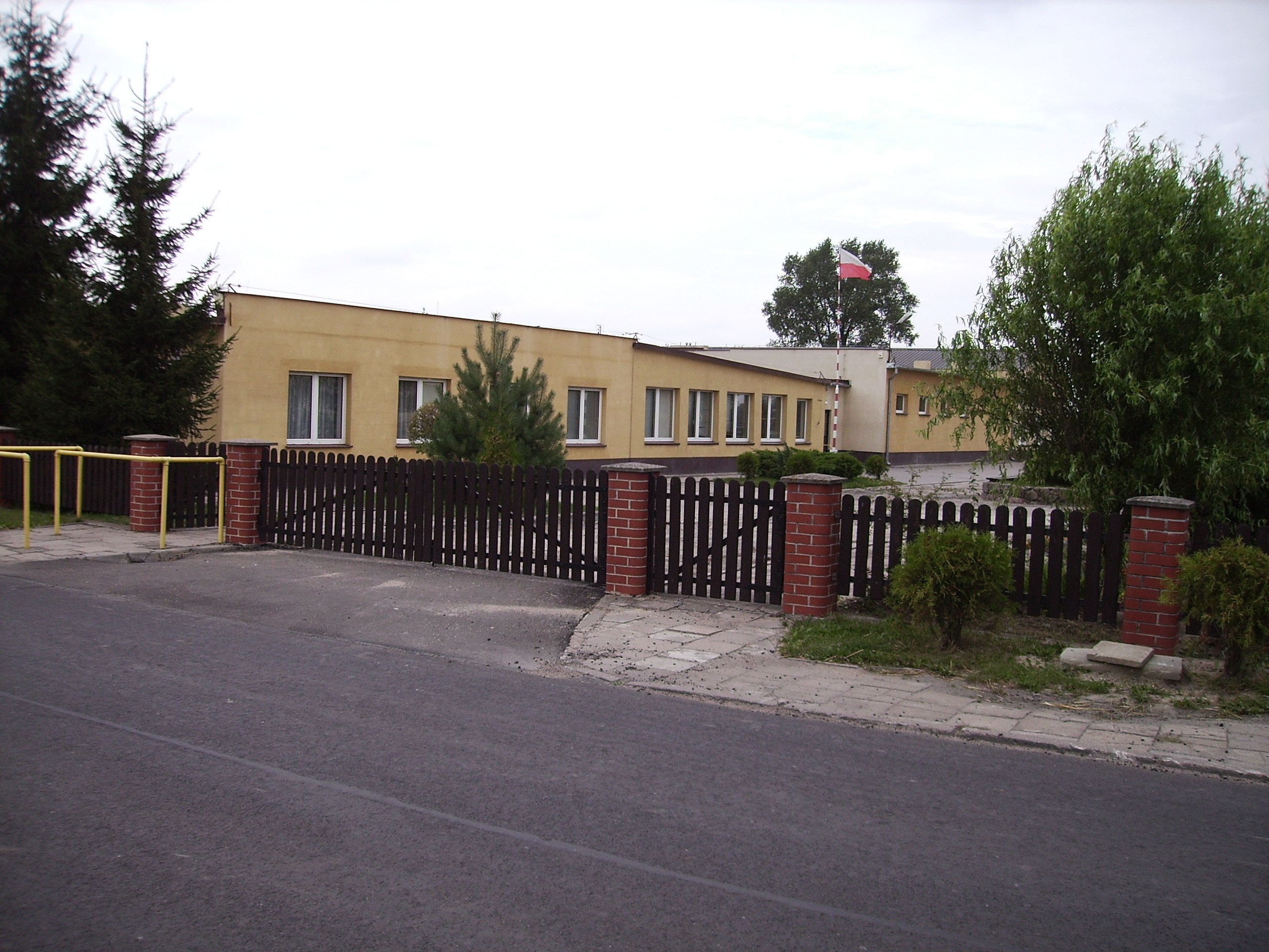 Szkoła podstawowa w Dubielnie